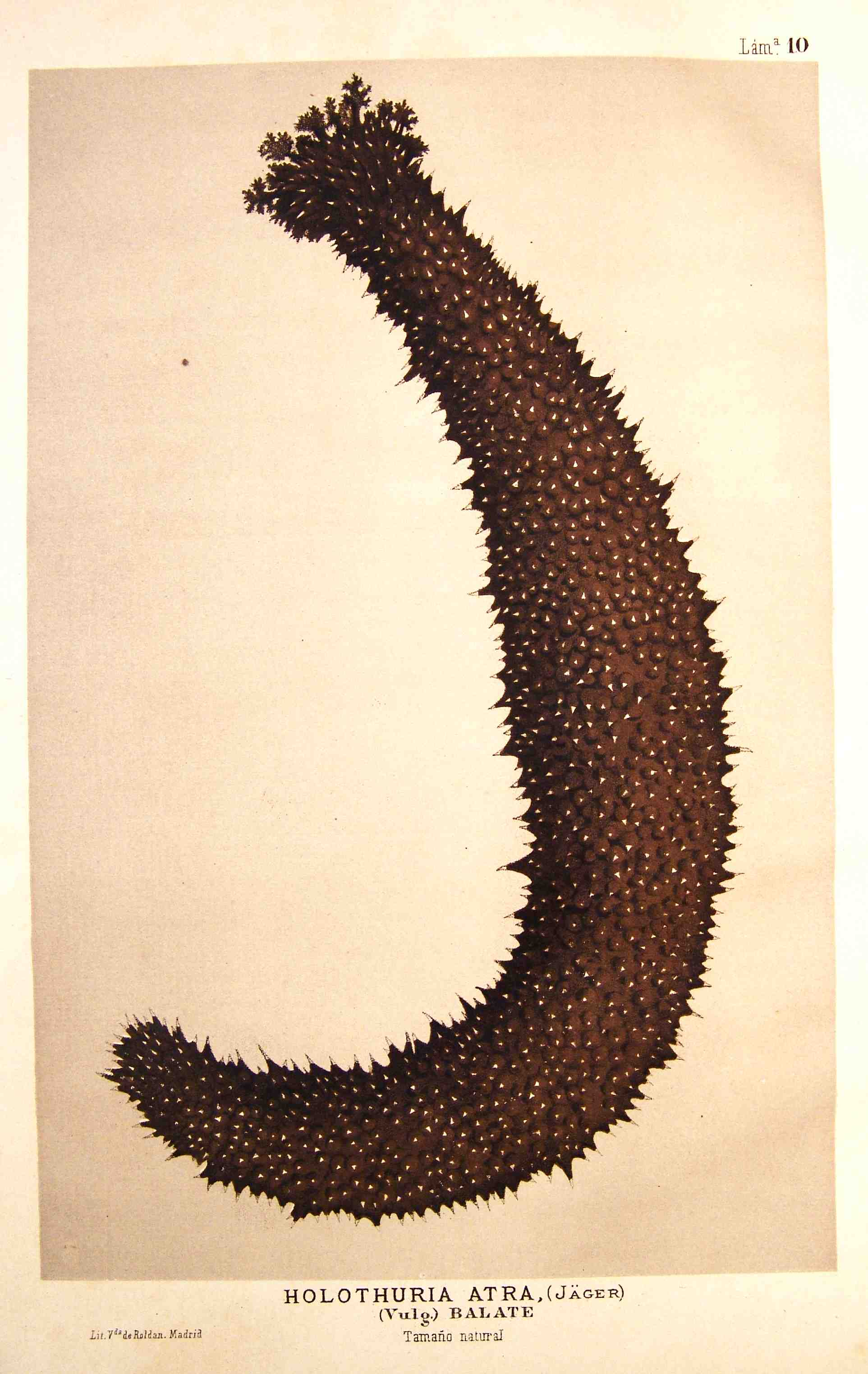 Black sea cucumber Holothuria leucospilota, despite the caption saying Holothuria atra. Puede acceder al libro completo en el siguiente enlace : Bosquejo geográfico e histórico-natural del archipielago filipino / por Ramón Jordana y Morera. - Madrid : Imprenta de Moreno y Rojas, 1885